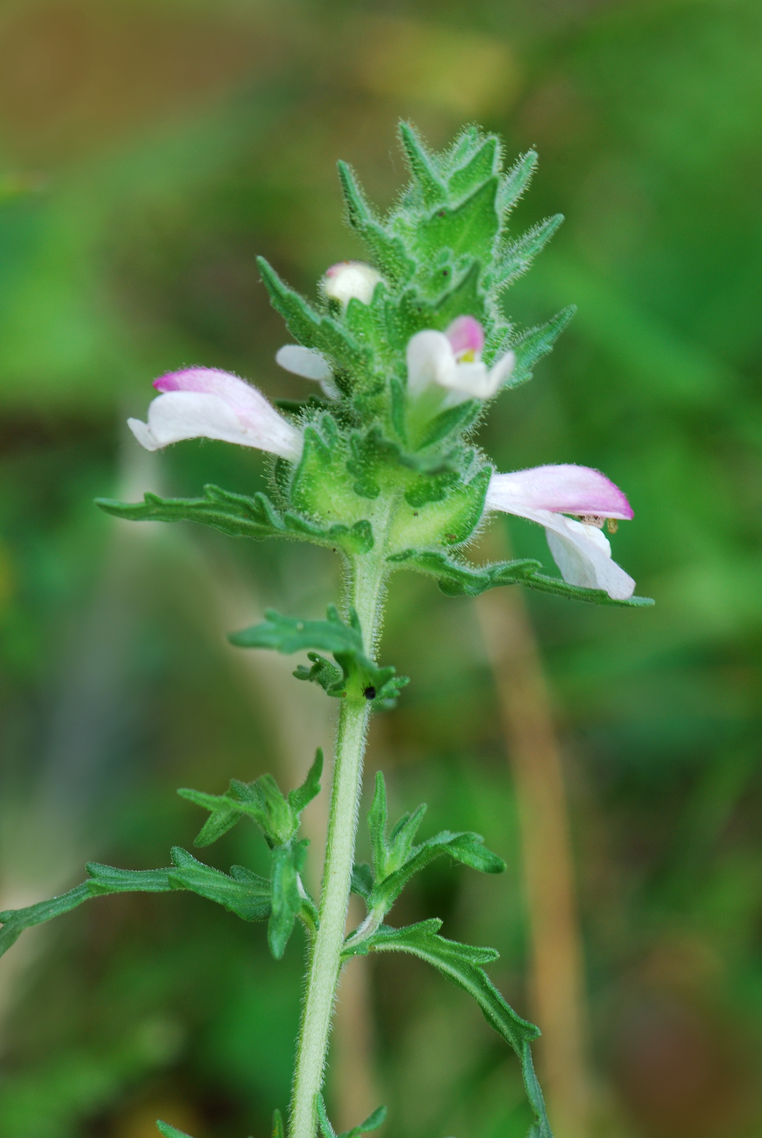 Bartsia trixago, Bartsie trixago, Monacia, Corse